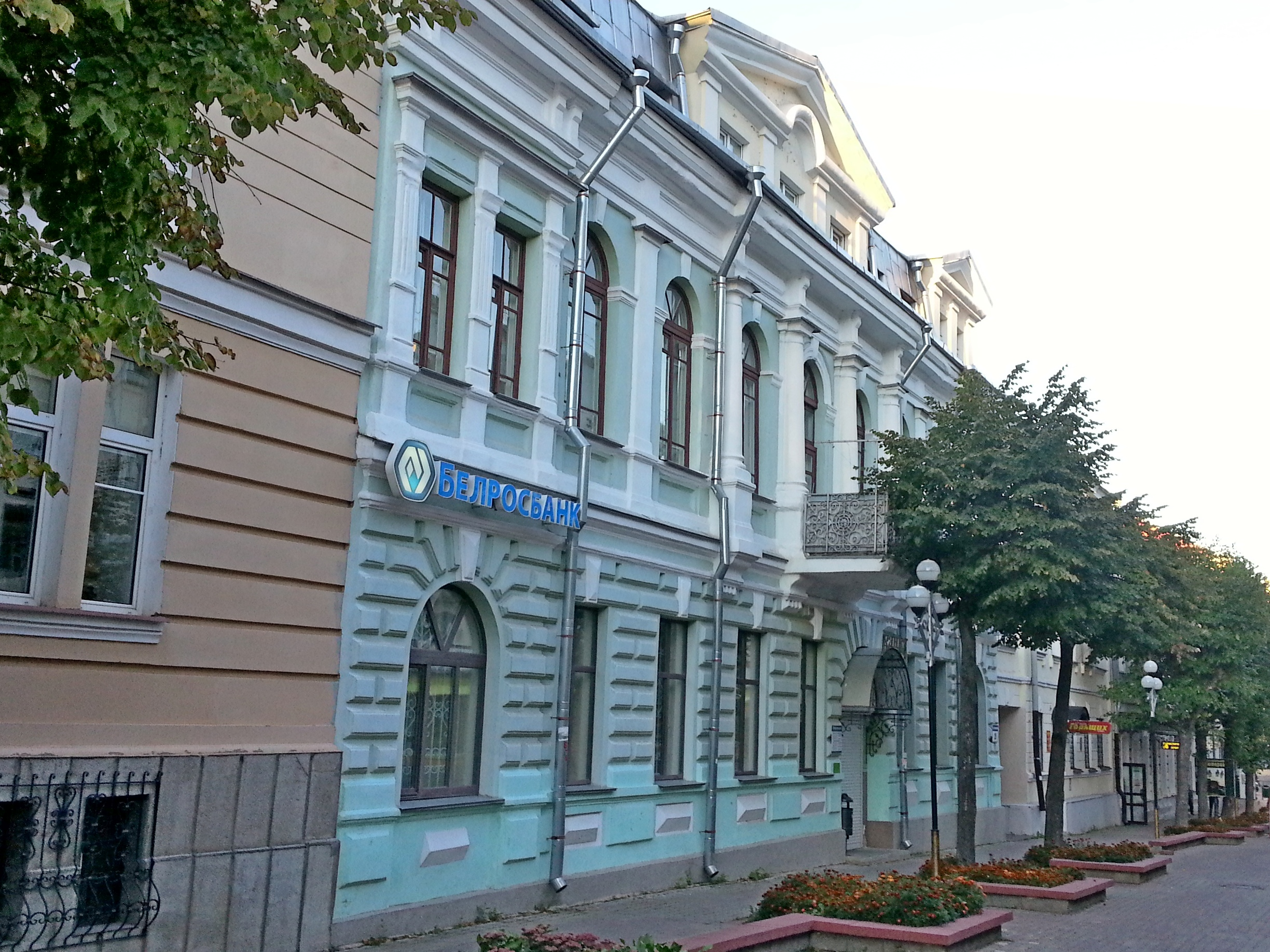 Беларуская (тарашкевіца): Забудова вул. Савецкай. г. Віцебск This is a photo of Belarusian heritage monument. Reference number: 213Г000074 ( WLM)